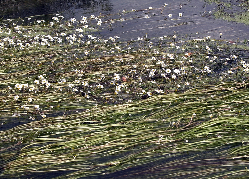 Flutender Wasserhahnenfuß (Ranunculus fluitans), Taubergießen, Deutschland, Germany